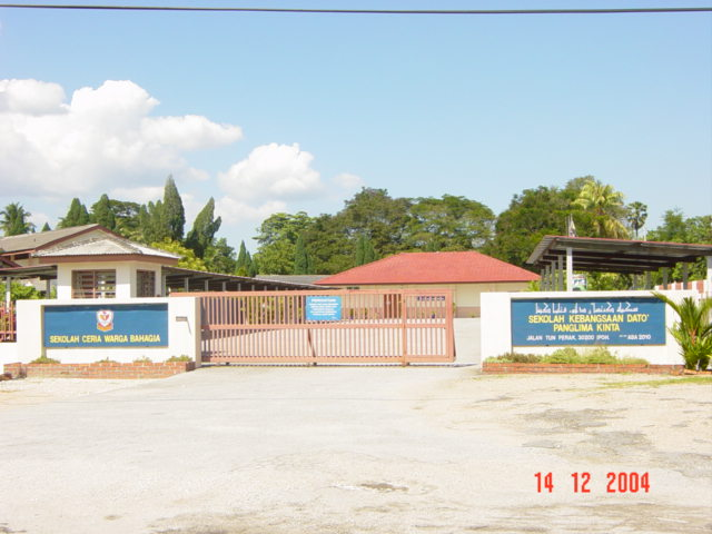 Pintu Masuk Utama